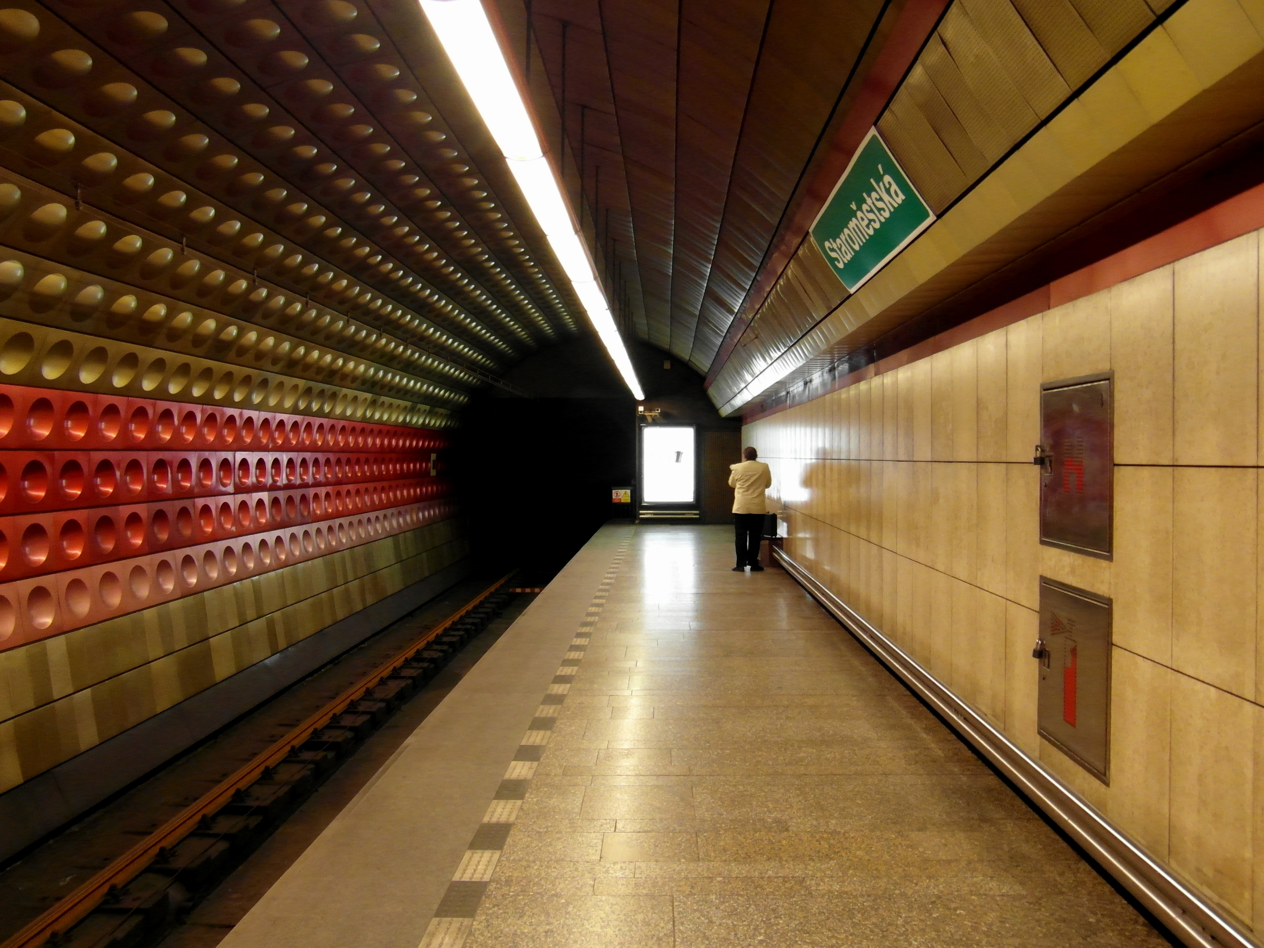 Praha - Metro - Staroměstská